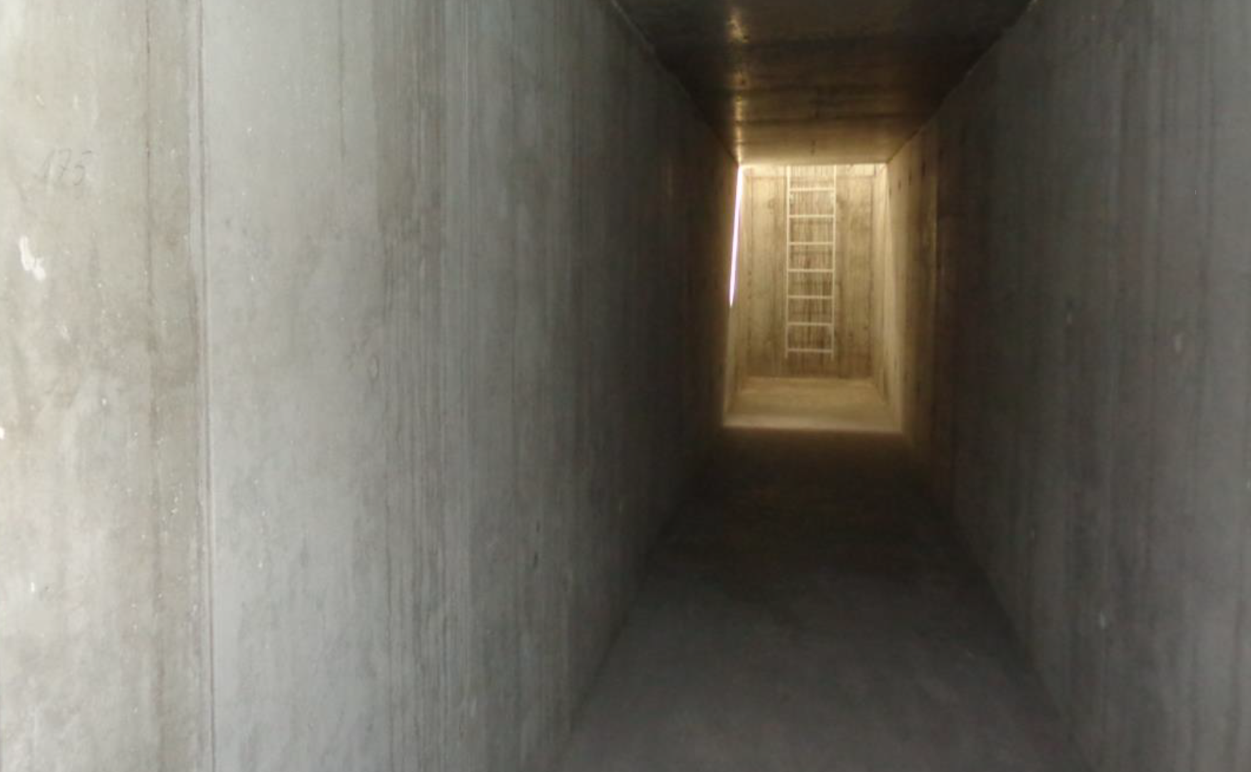 Podziemny tunel zakończony szybem to często spotykane rozwiązanie wyjścia zapasowego ze schronu.